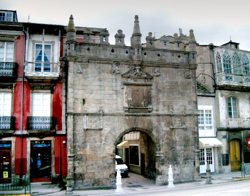 Porta Maior, desde a Ponte da Misericordia